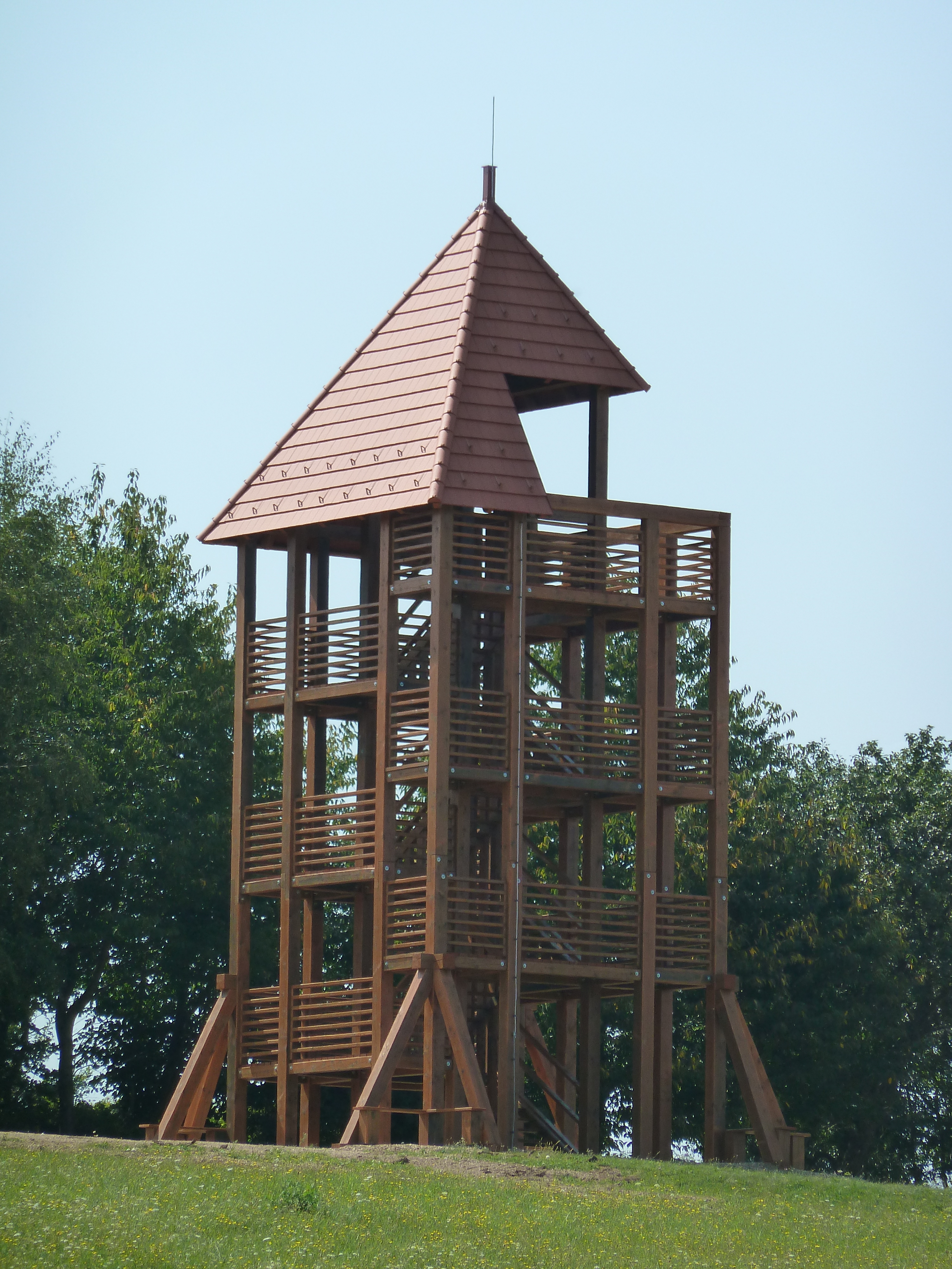 A kétvölgyi új kilátó